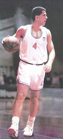 Grob Dražena Petrovića na Mirogoju u Zagrebu